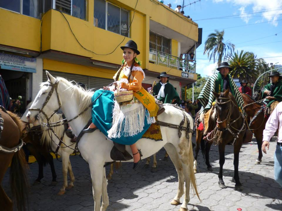 Mujer Chagra, también conocida como Chagra Warmi.